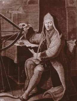 Hell Miksa magyar csillagász, matematikus, fizikus.